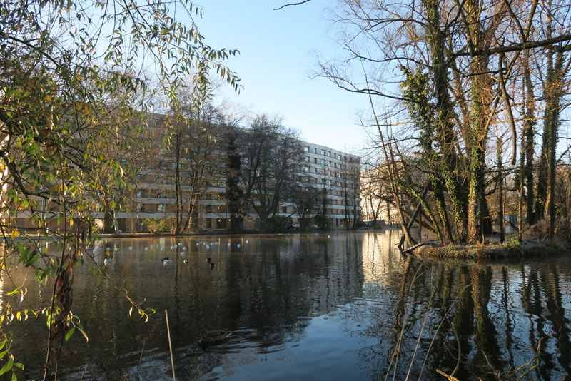 Zellwegerweiher im Zellwegerpark, Uster